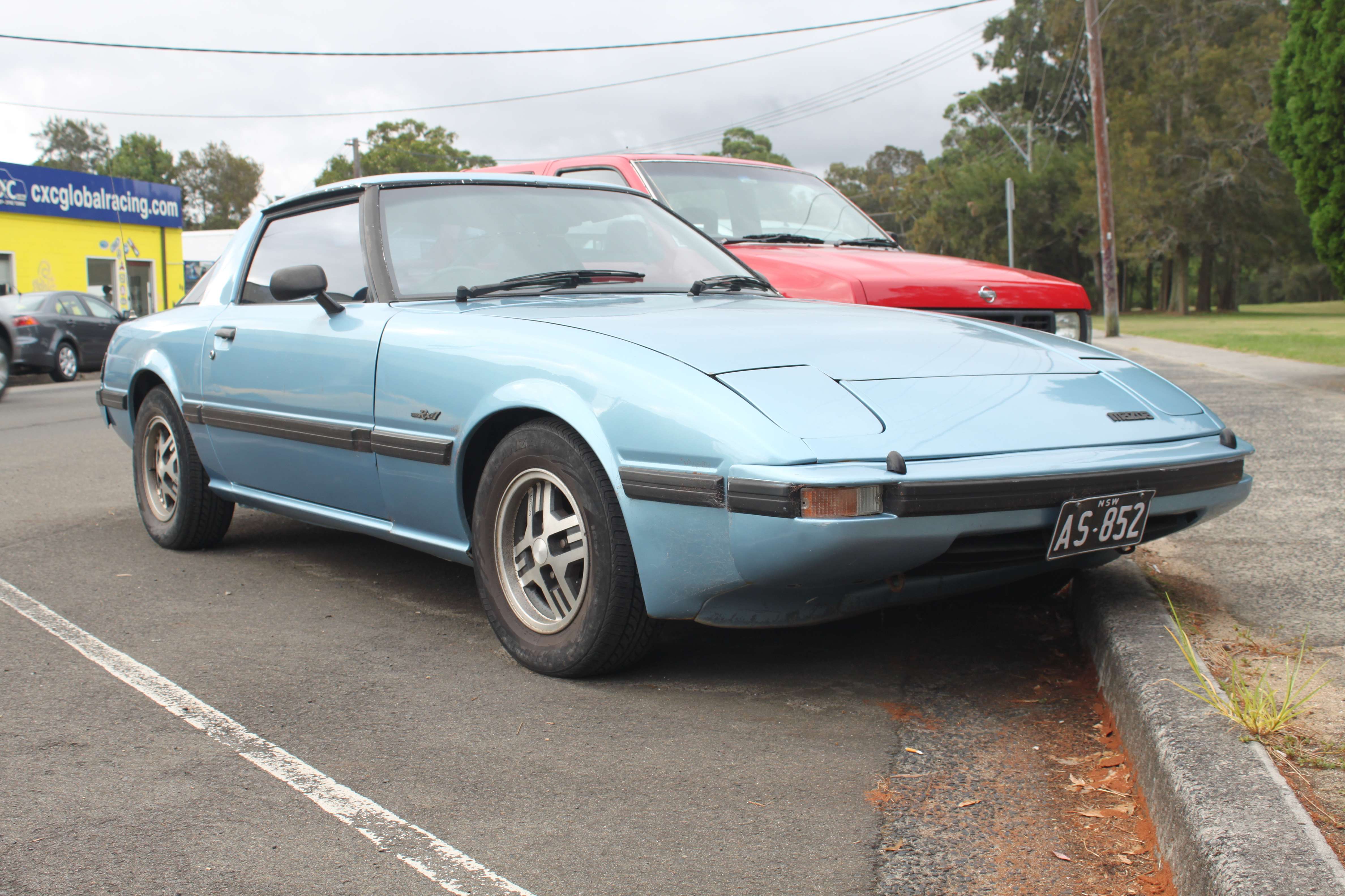 Mazda RX7 Series 2